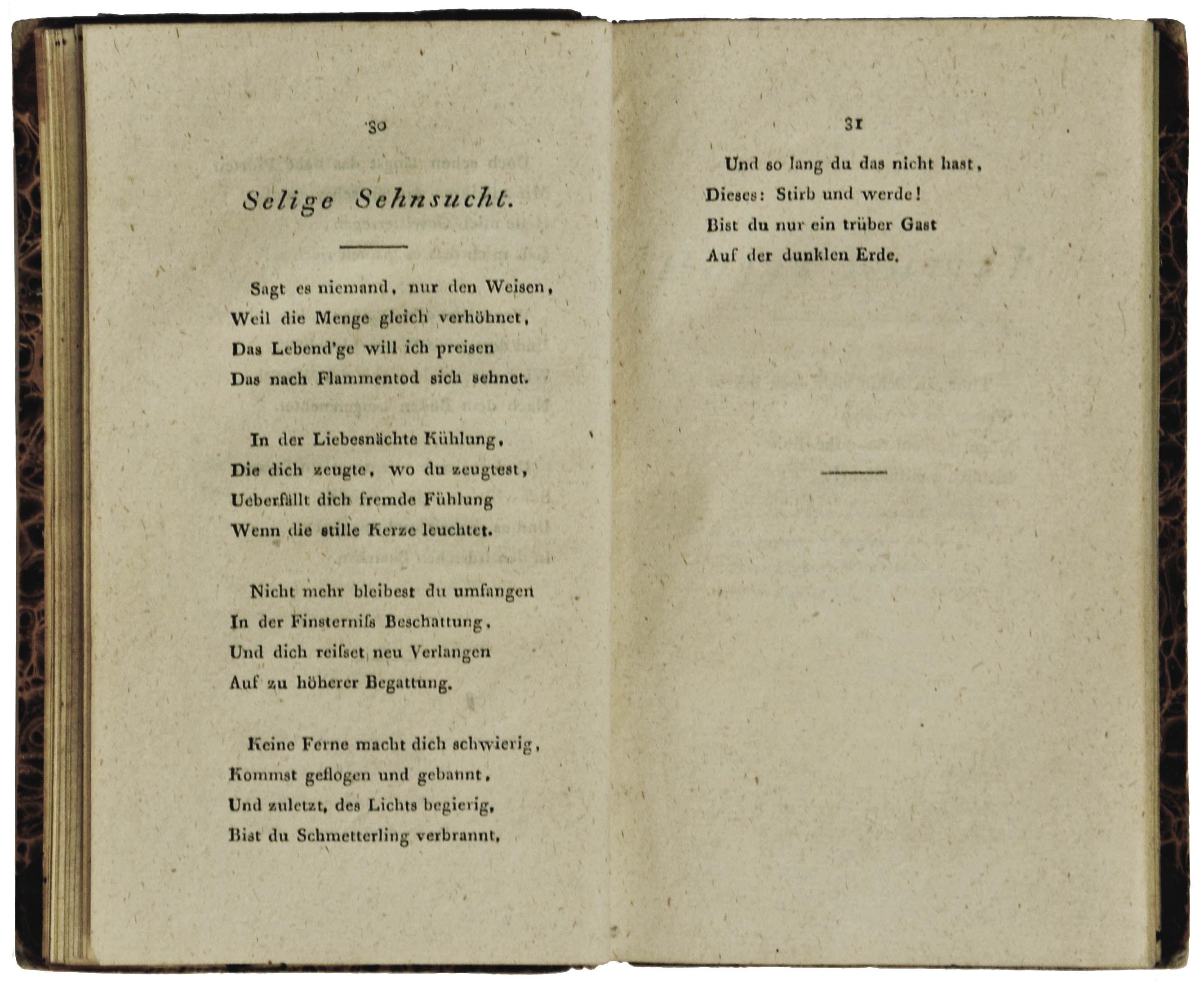 Typographie der Erstausgabe